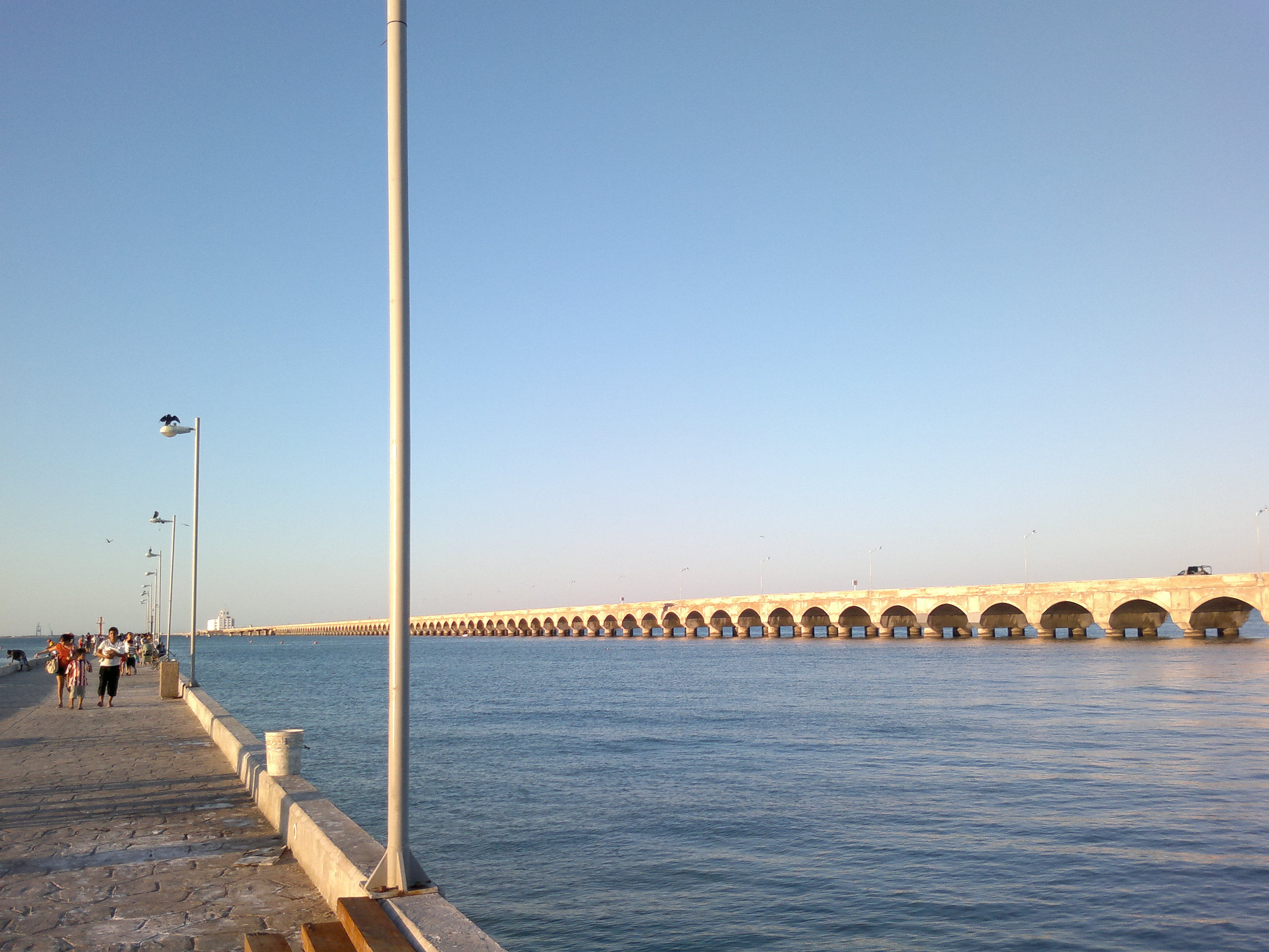 Muelle Altura Progreso